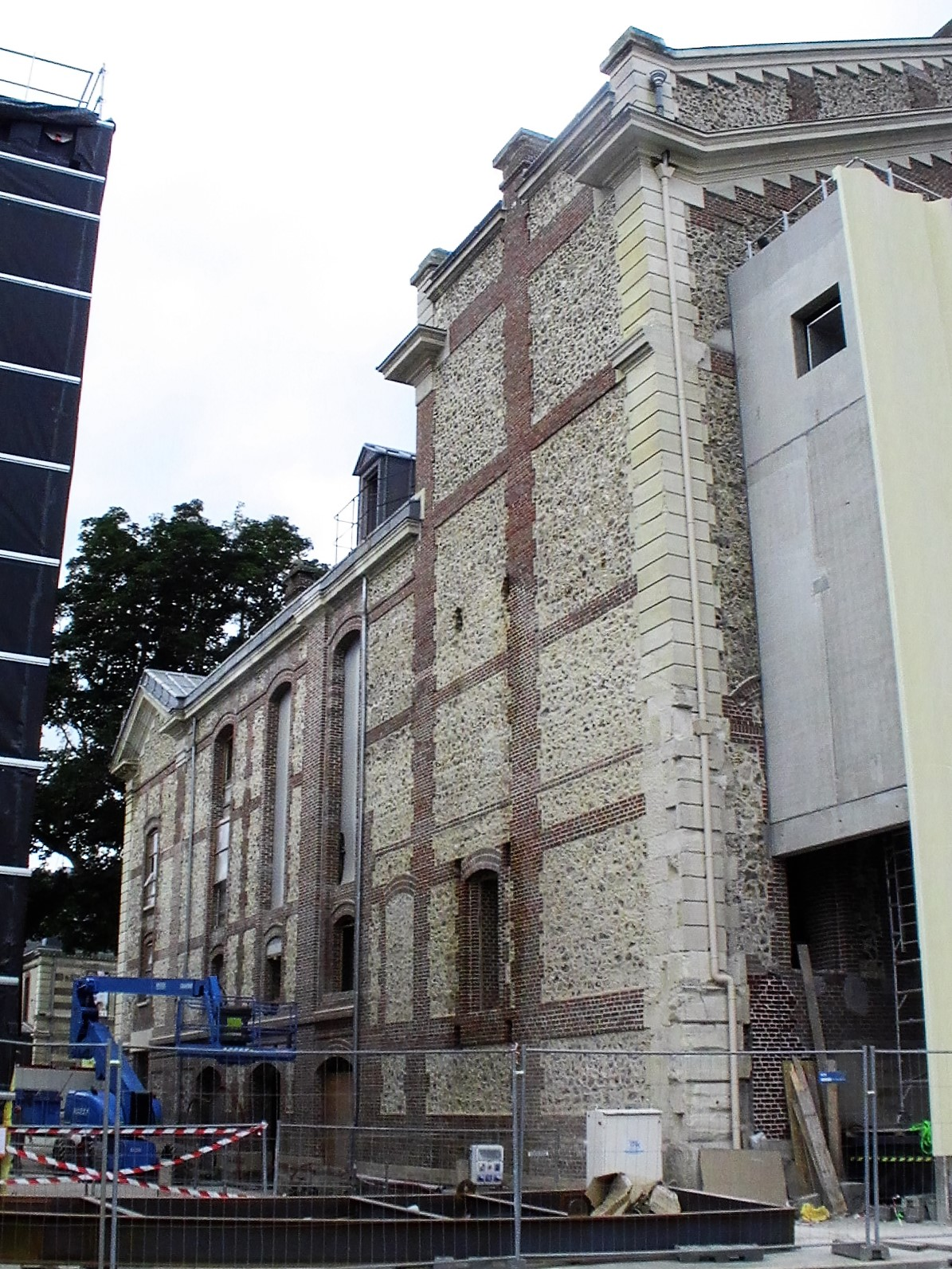 Tournée à Evreux - automne 2017.